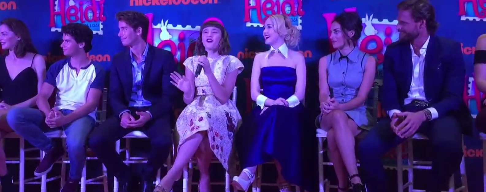 Elenco de Heidi, bienvenida a casa durante una conferencia de prensa en Buenos Aires, Argentina